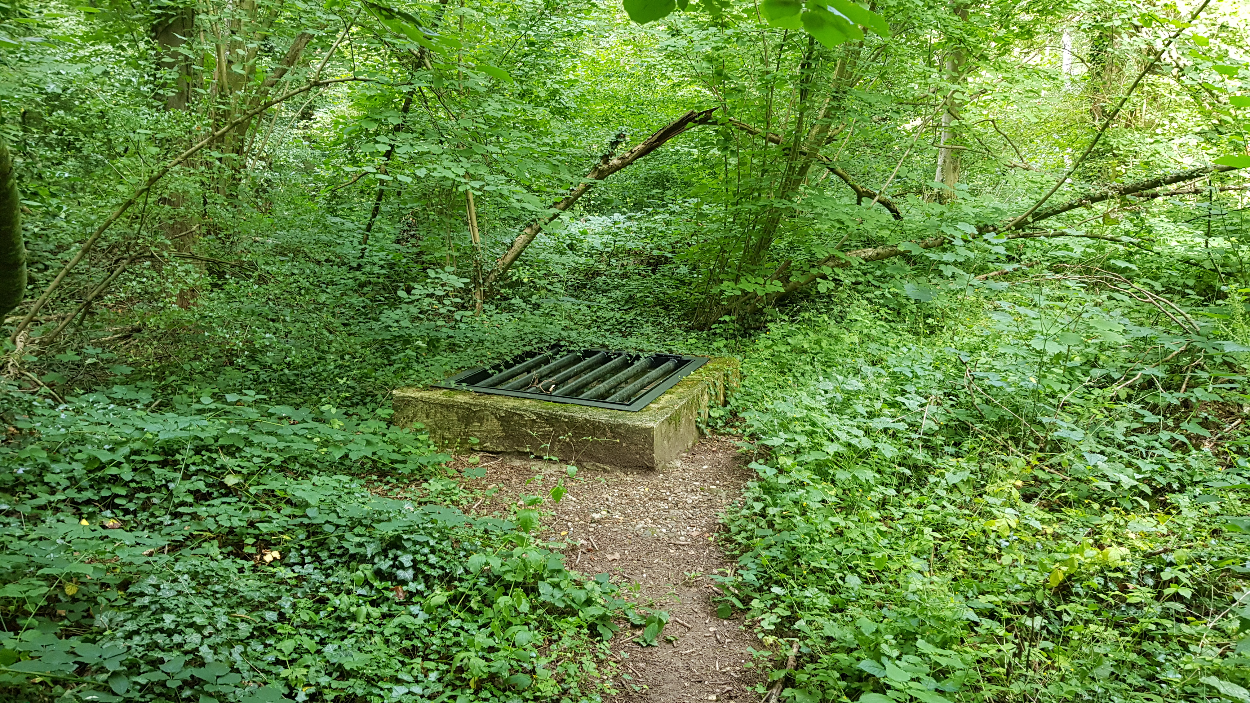 Groeve Scheggeldergrub III bij Scheggelder Grub in Savelsbos, Nederland